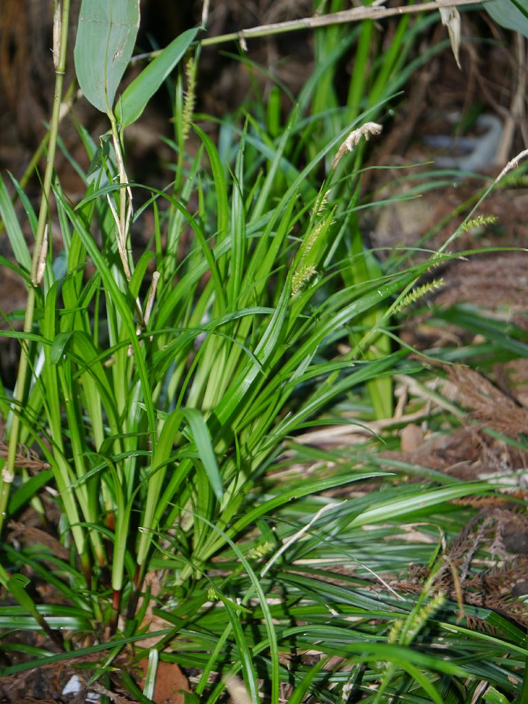 2018/05/05 滋賀県：Shiga Pref. Japan.